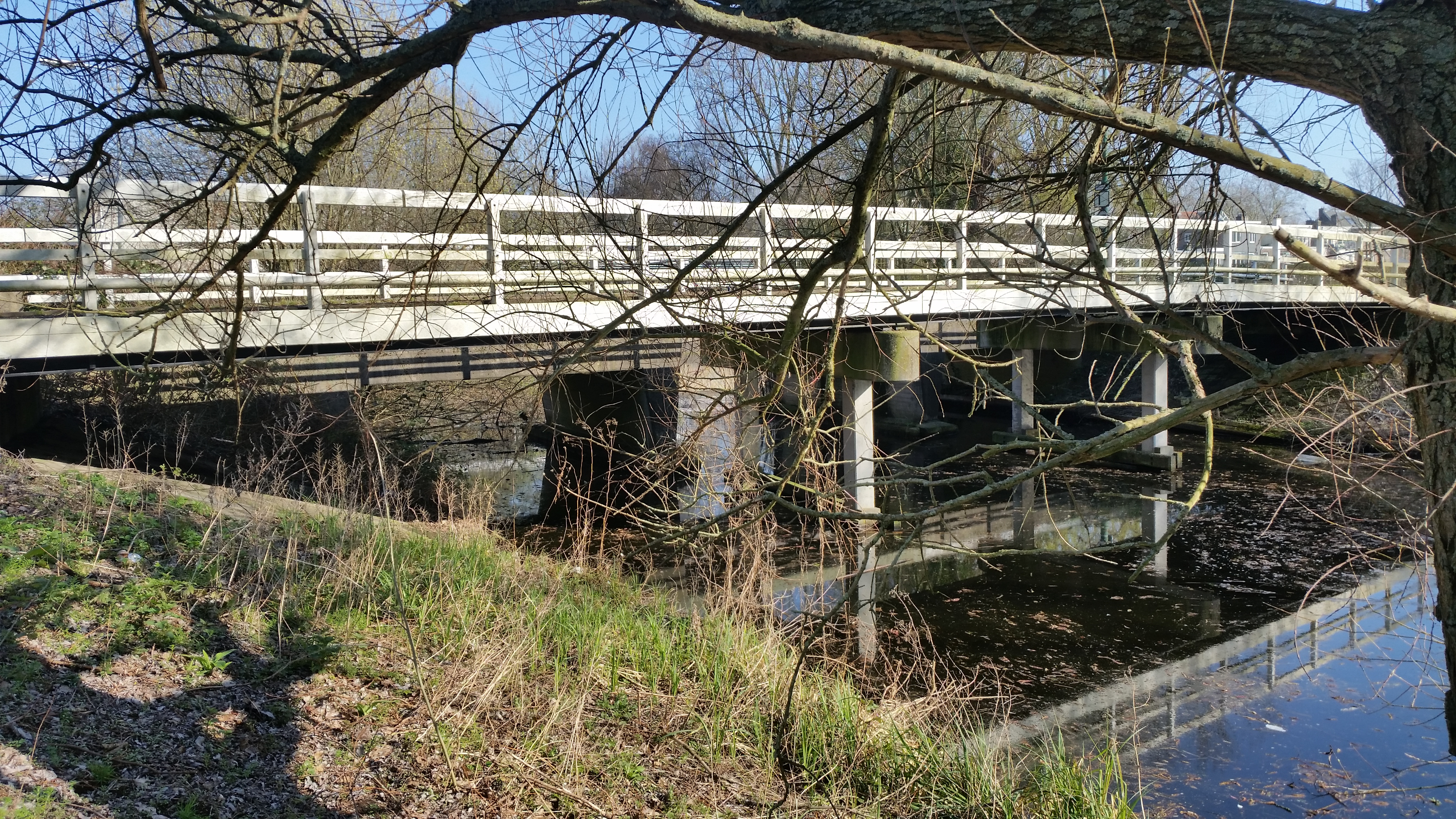 Zijaanzicht van Brug 1552 (in Amsterdam)